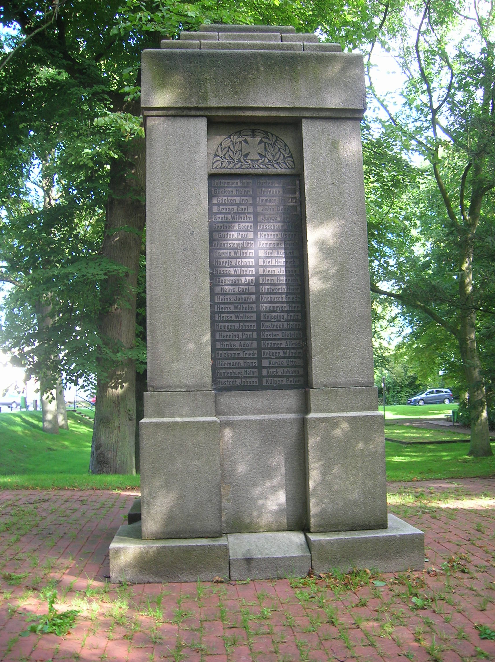 Denkmal für die Wulsdorfer Gefallenen des Ersten Weltkriegs